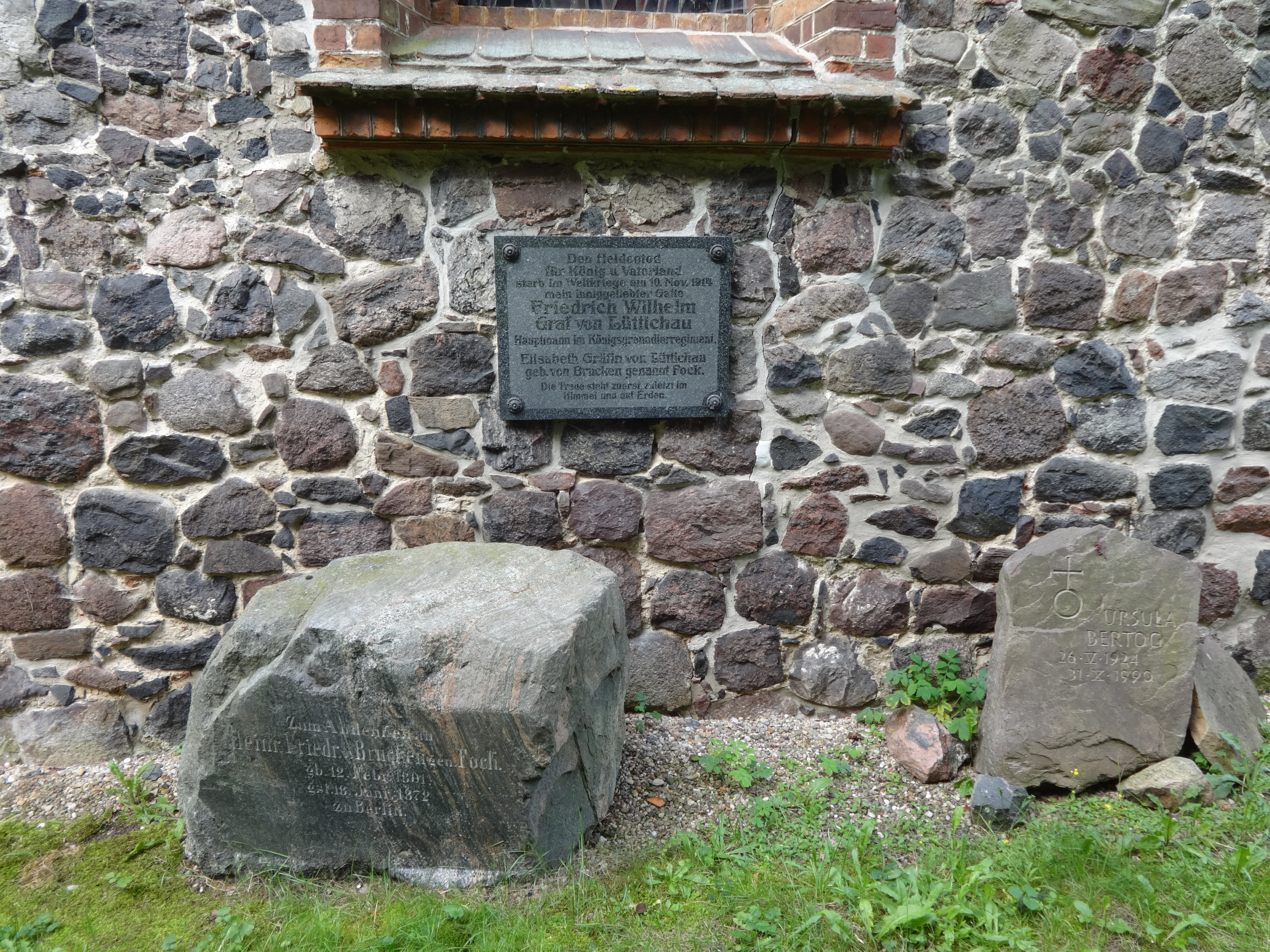 Die Dorfkirche in Stücken im Landkreis Potsdam-Mittelmark ist ein neugotischer Feldsteinbau aus dem Jahr 1860. Die Ausstattung stammt überwiegend aus dem 1950er Jahren.